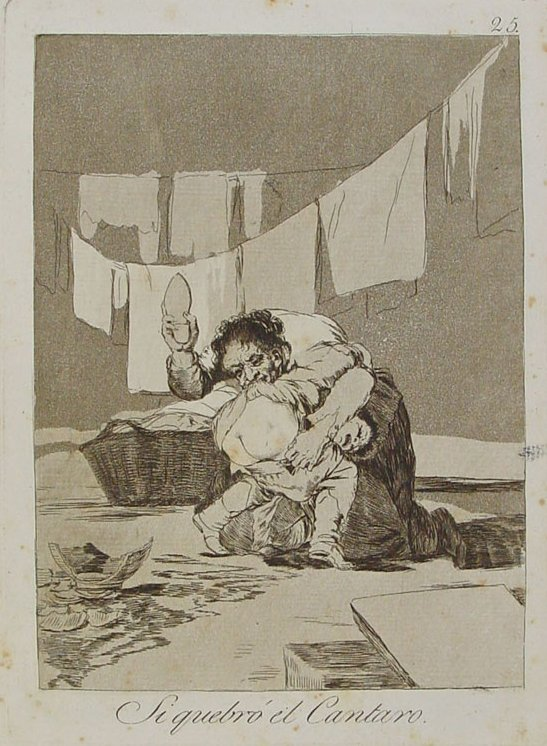 Capricho nº 25: Si quebró el cántaro de Goya, serie Los Caprichos